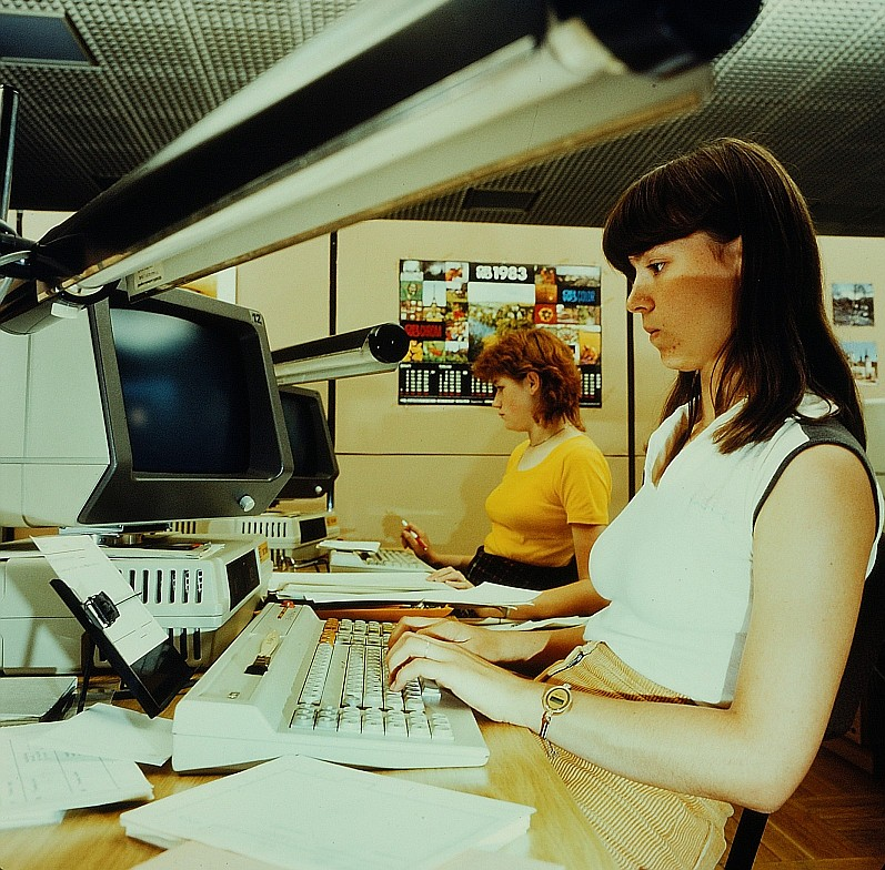 Original image description from the Deutsche FotothekFacharbeiter für Satztechnik